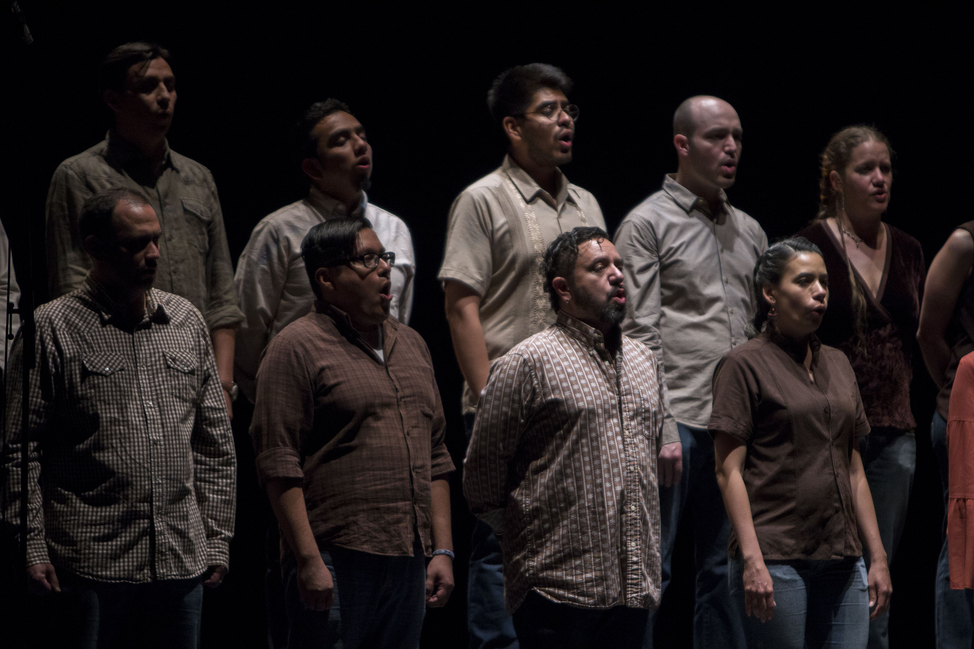 Sábado 1 de octubre de 2016 En el Teatro de la Ciudad Esperanza Iris se presentó el espectáculo Al pie de un árbol. Celebrando el canto Cardenche, a cargo de Los Cardencheros de Sapioriz y el Coro Acardenchado, dirigido por Juan Pablo Villa. Fotografía: Maritza Rios / Secretaría de Cultura CDMX